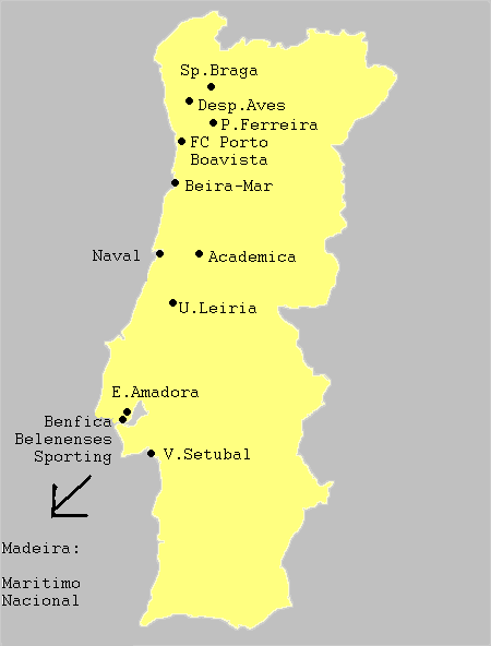 Carte des clubs du championnat du portugal de football 2006-2007